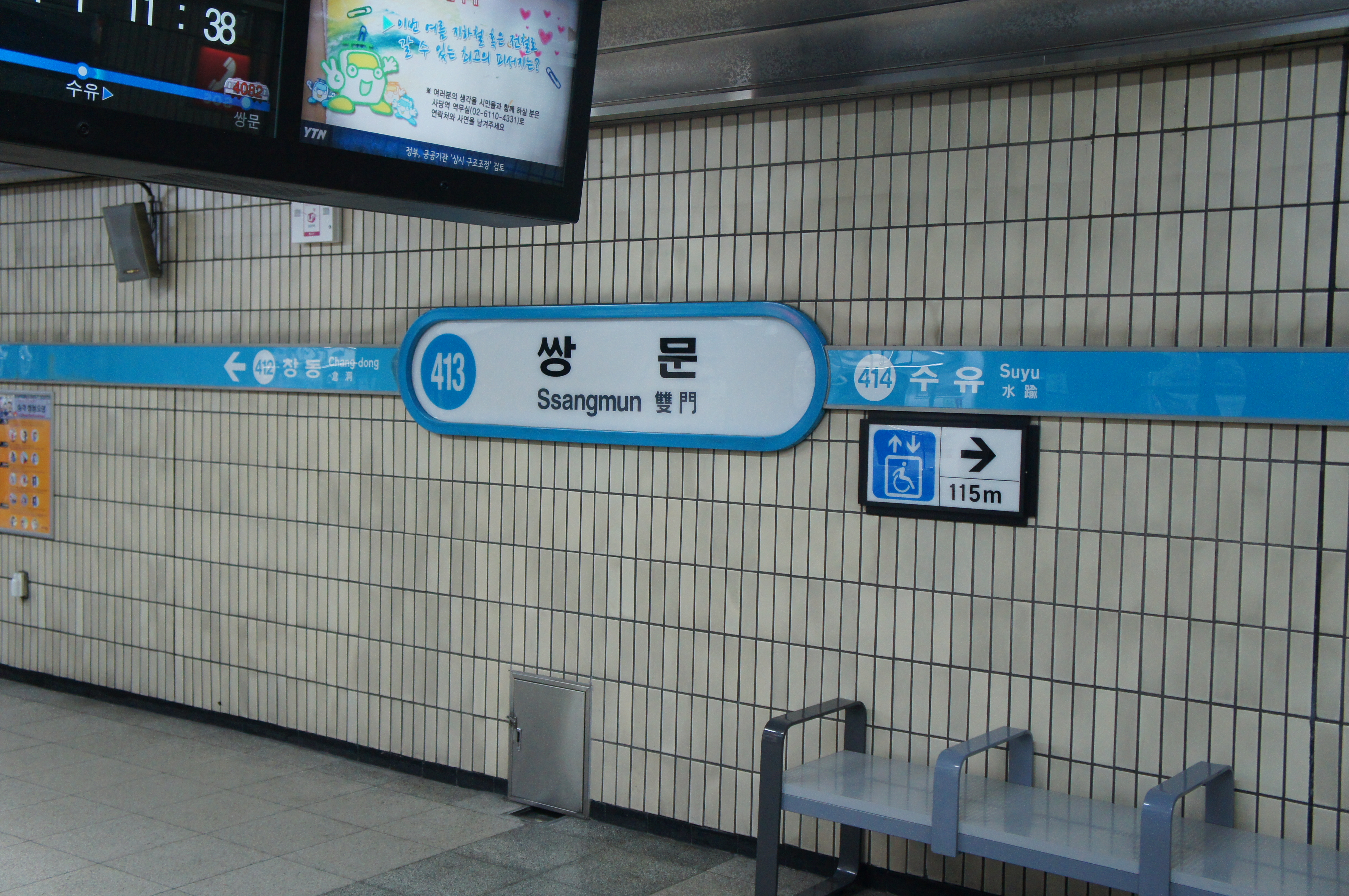 쌍문역 역명판